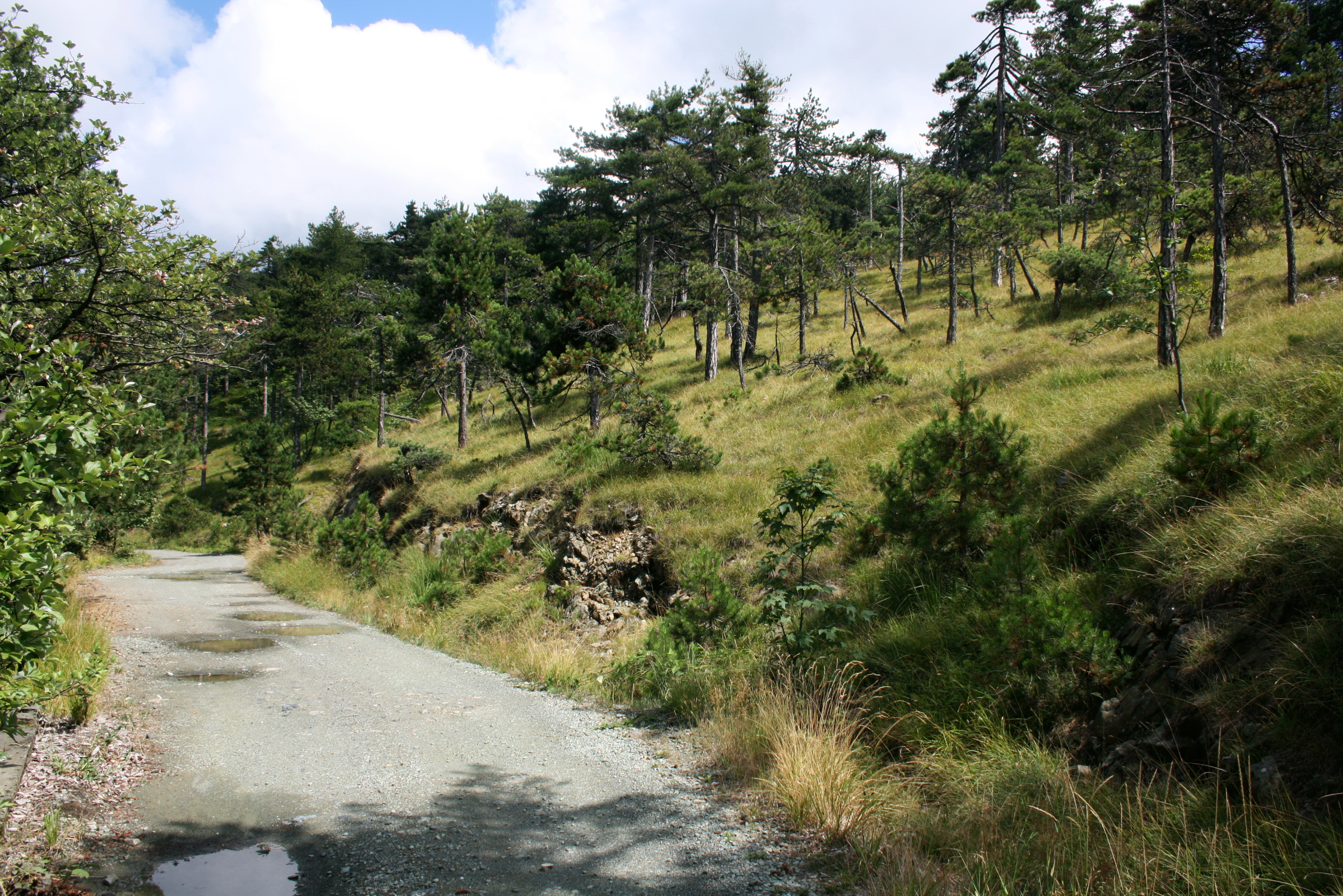 Feldweg in Norditalien zur Waldbewirtschaftung - Pratorondanino Region Ligurien